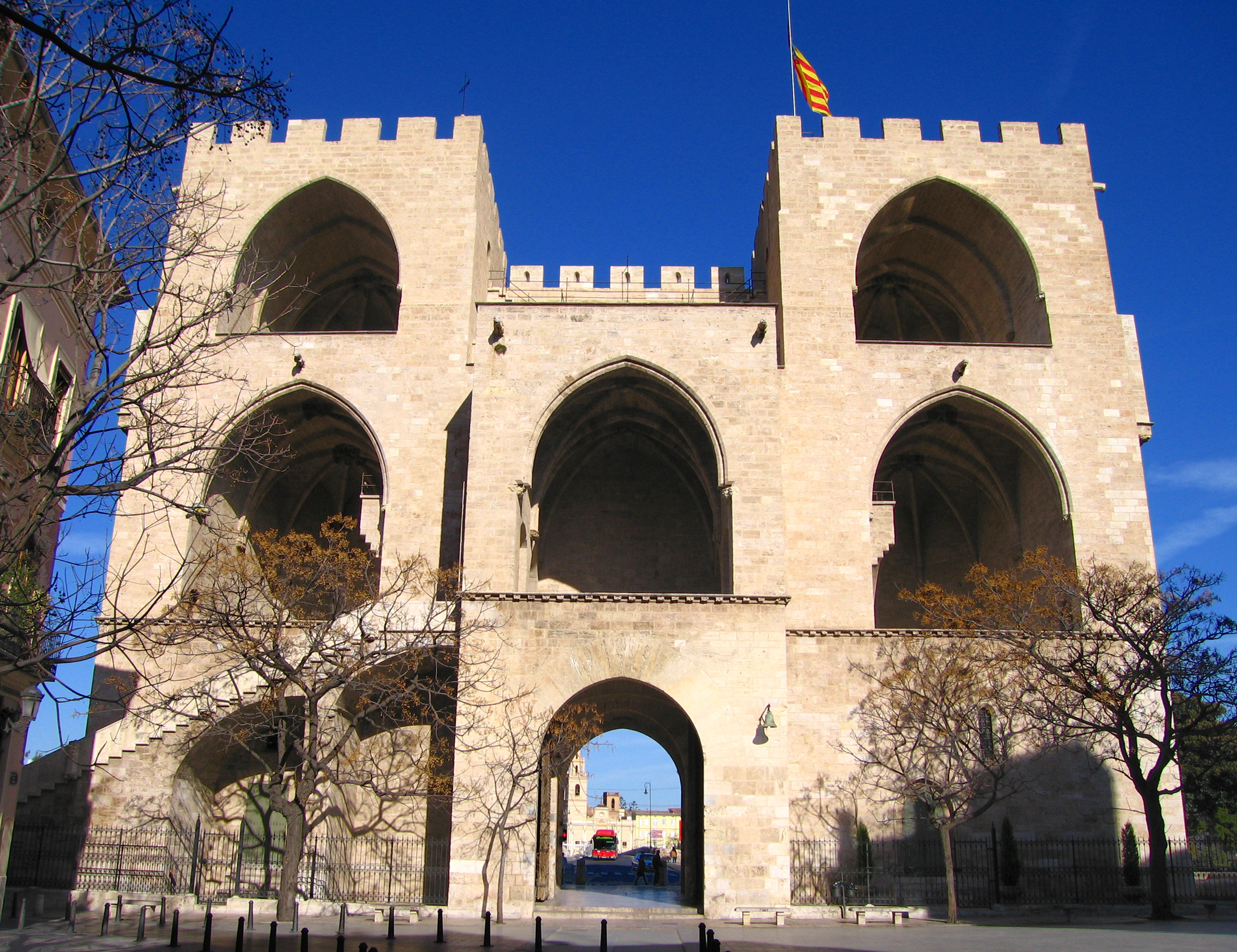 Torres de Serrans (València)